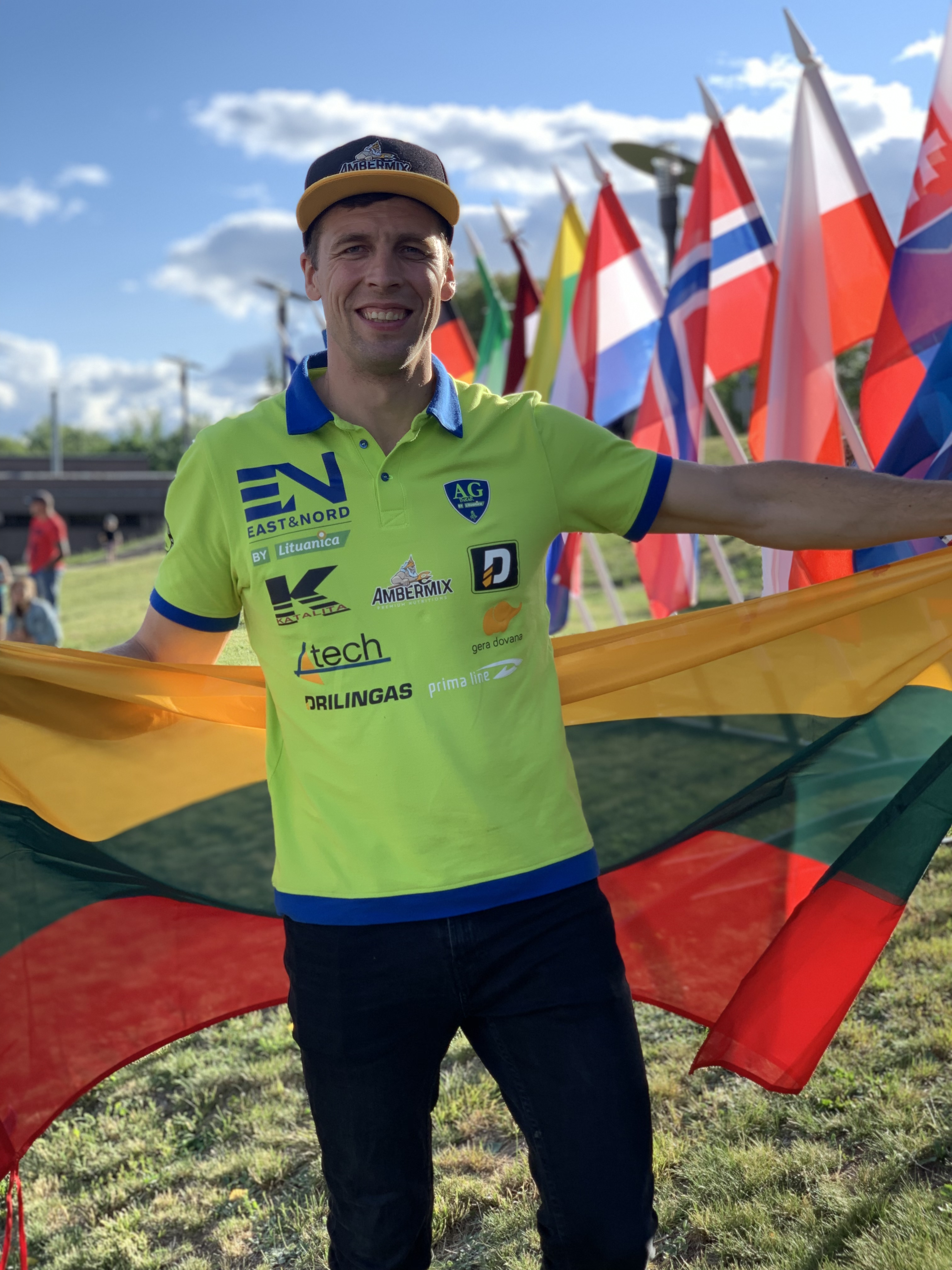 Arūnas Gelažninkas